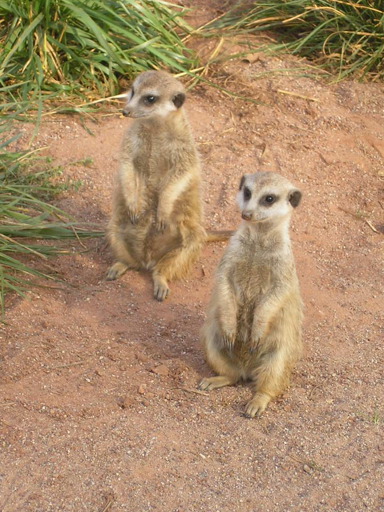 2 Erdmännchen im Zoo in Erfurt.